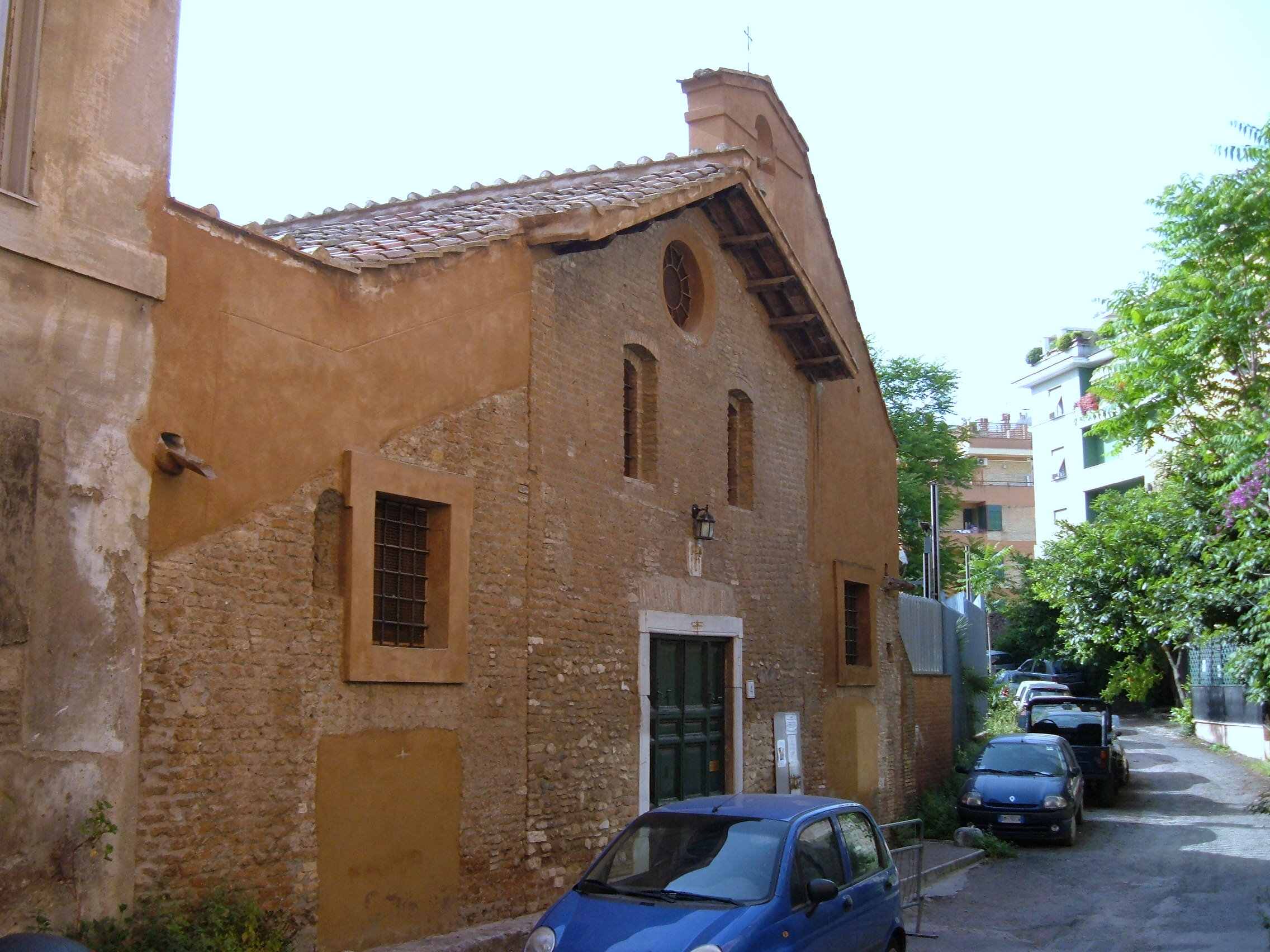 Chiesa di San Lazzaro (XII secolo), a Roma, nel quartiere Della Vittoria.